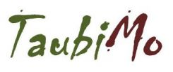 KSTBB TaubiMo - Tauberbischofsheimer Modell des Uebungsfirmenunterrichts, Kaufmännische Schule Tauberbischofsheim